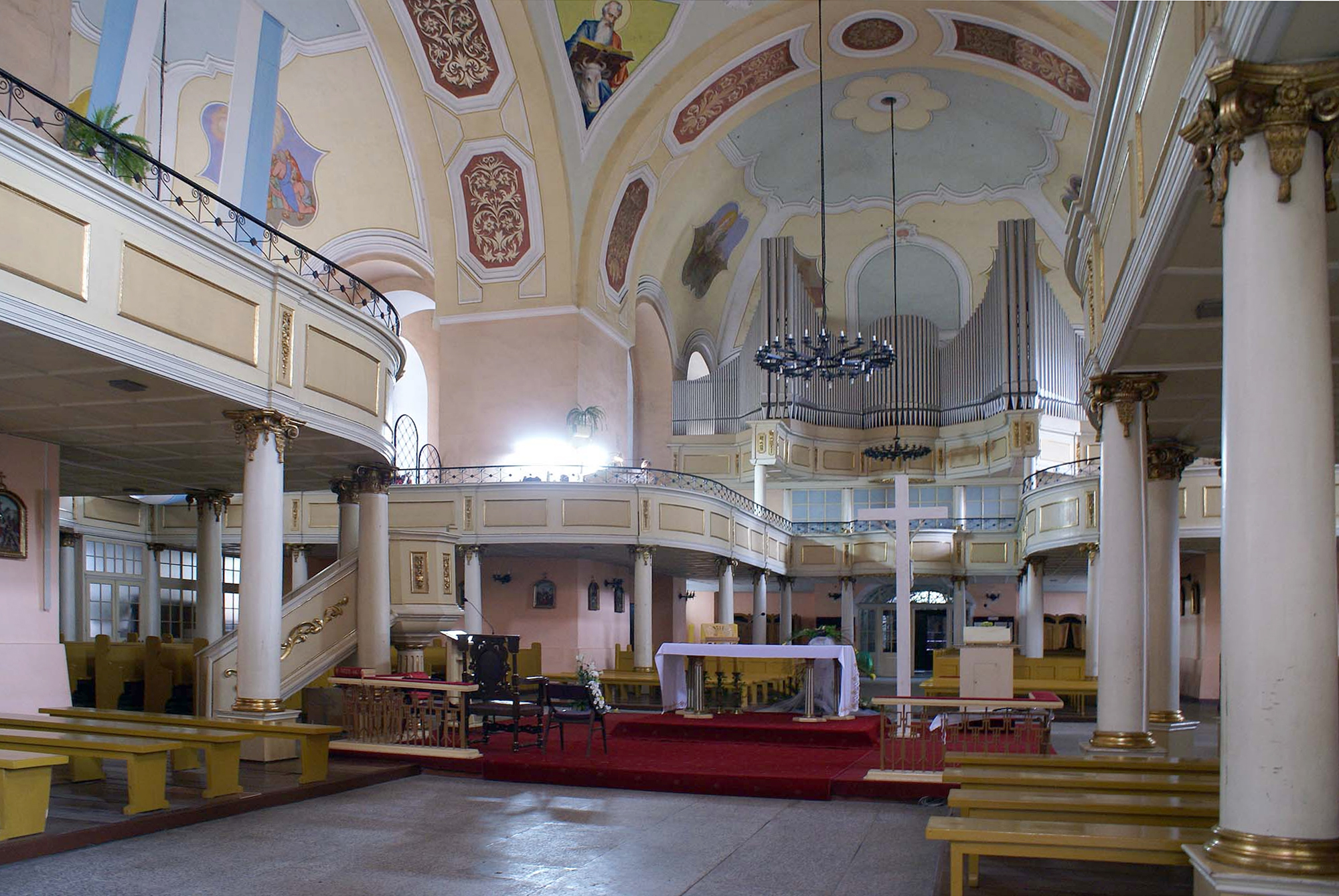 Kamienna Góra, kościół rzym.-kat. par. pw. MB Różańcowej, (d. ewangelicki Kościół Łaski), 1709-1730